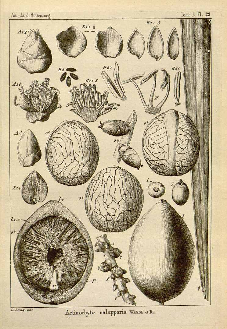 Клаппова пальма